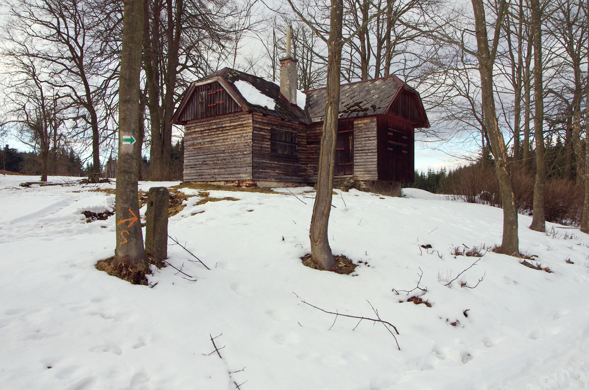 zaniklá obec Milíře, Slavkovský les, okres Sokolov